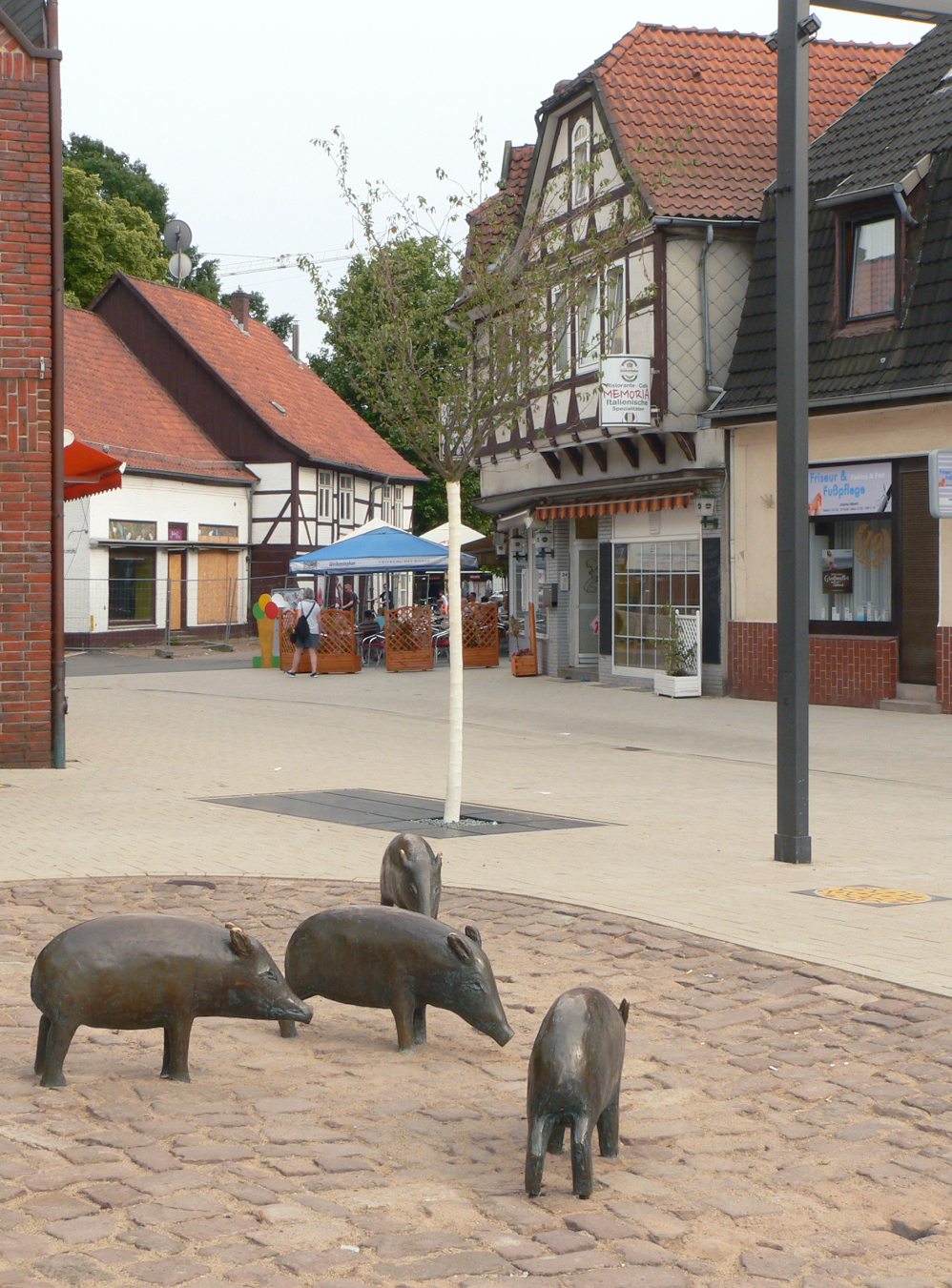 Gehrden Fussgängerzone nach der Umgestaltung von 2017